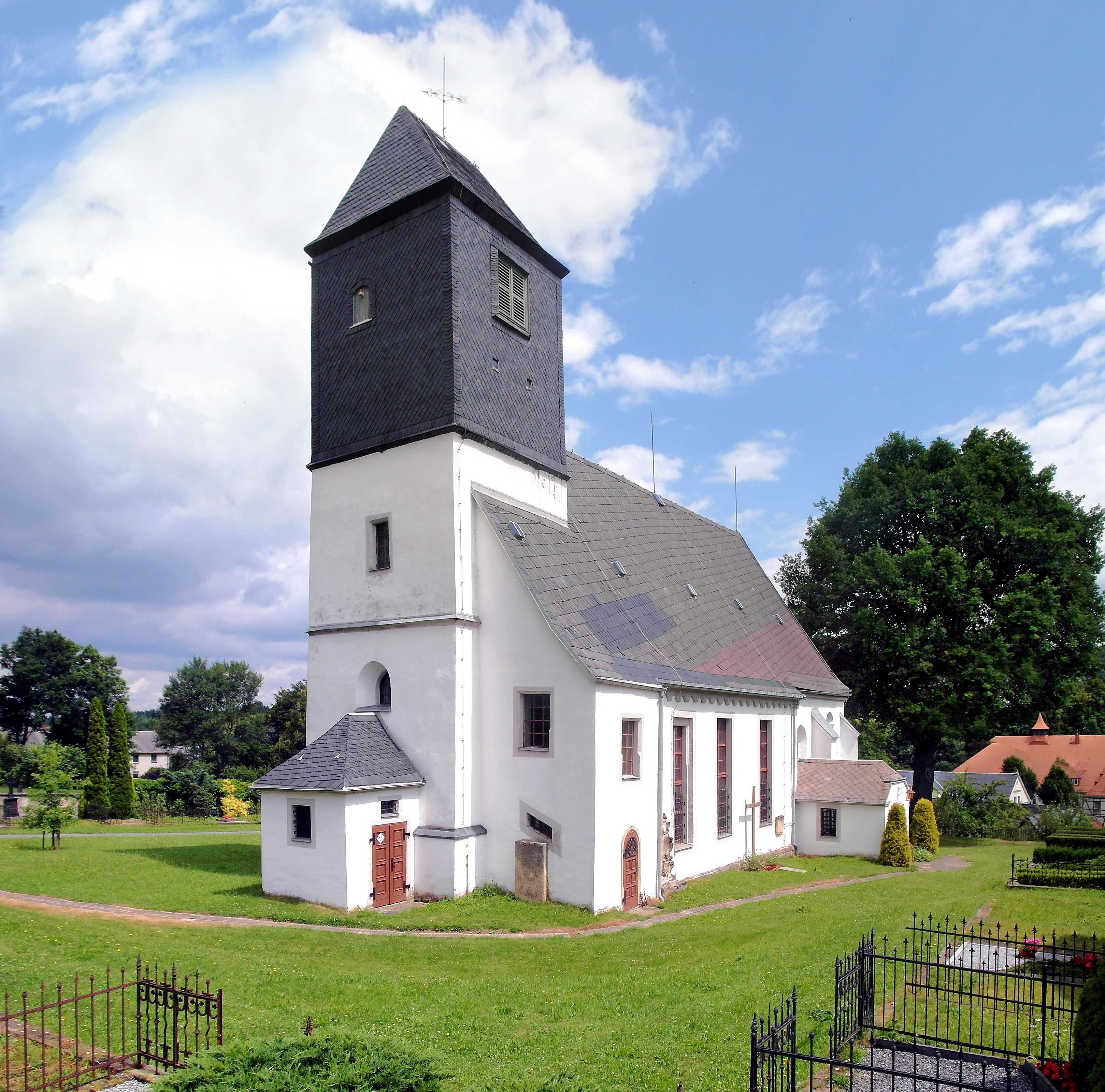 01.07.2014 01774 Höckendorf (Klingenberg): Dorfkirche, Kirchweg 1 (GMP: 50.926062,13.587406). Romanische Kirche in Höckendorf, um 1325 erbaut (einschließlich Nachbargebäude auf den Grundmauern der ehemaligen Burg bzw. des Rittergutes der Ritter von Theler) am Heiligen Weg. Der Rundbogenfries an den Außenwänden stammt aus der Romanik. [SAM4900-4901.JPG]20140701070MDR.JPG(c)Blobelt